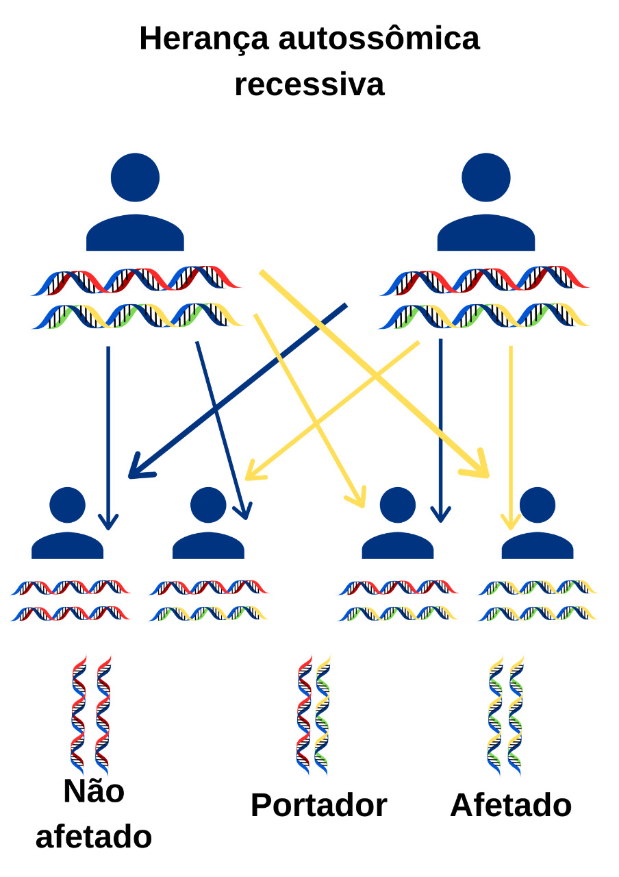 Esquema de acordo com o padrão de herança recessivo